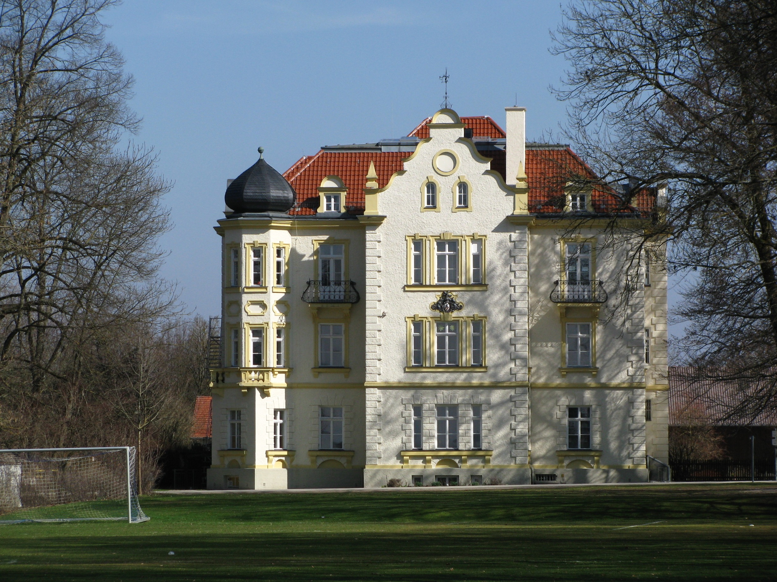 Gut Buchhof; Gutshaus, herrschaftlicher dreigeschossiger Neurenaissancebau mit Erkerturm, Giebelrisaliten und Belvedere. Nördlich anschließender Wohn- und Wirtschaftstrakt mit Mansarddächern. Um 1880 von Georg Hauberrisser für die Familie von Maffei erbaut.